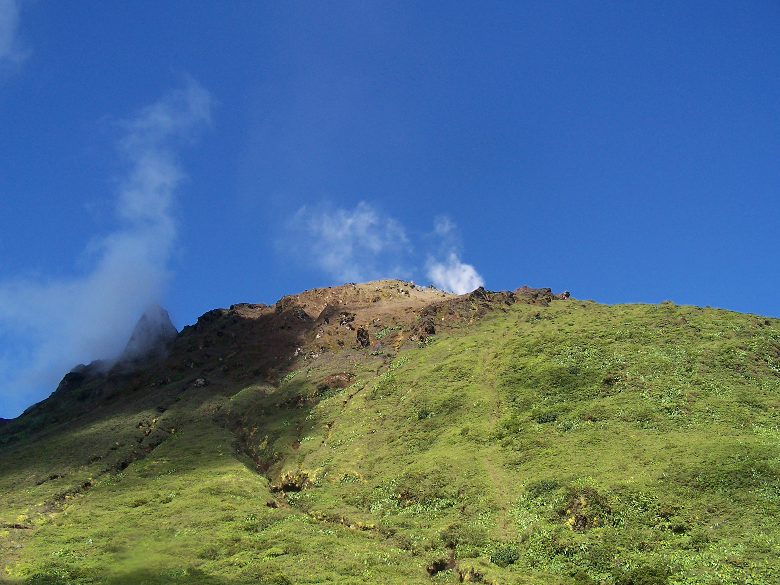 La Soufrière vue du bas